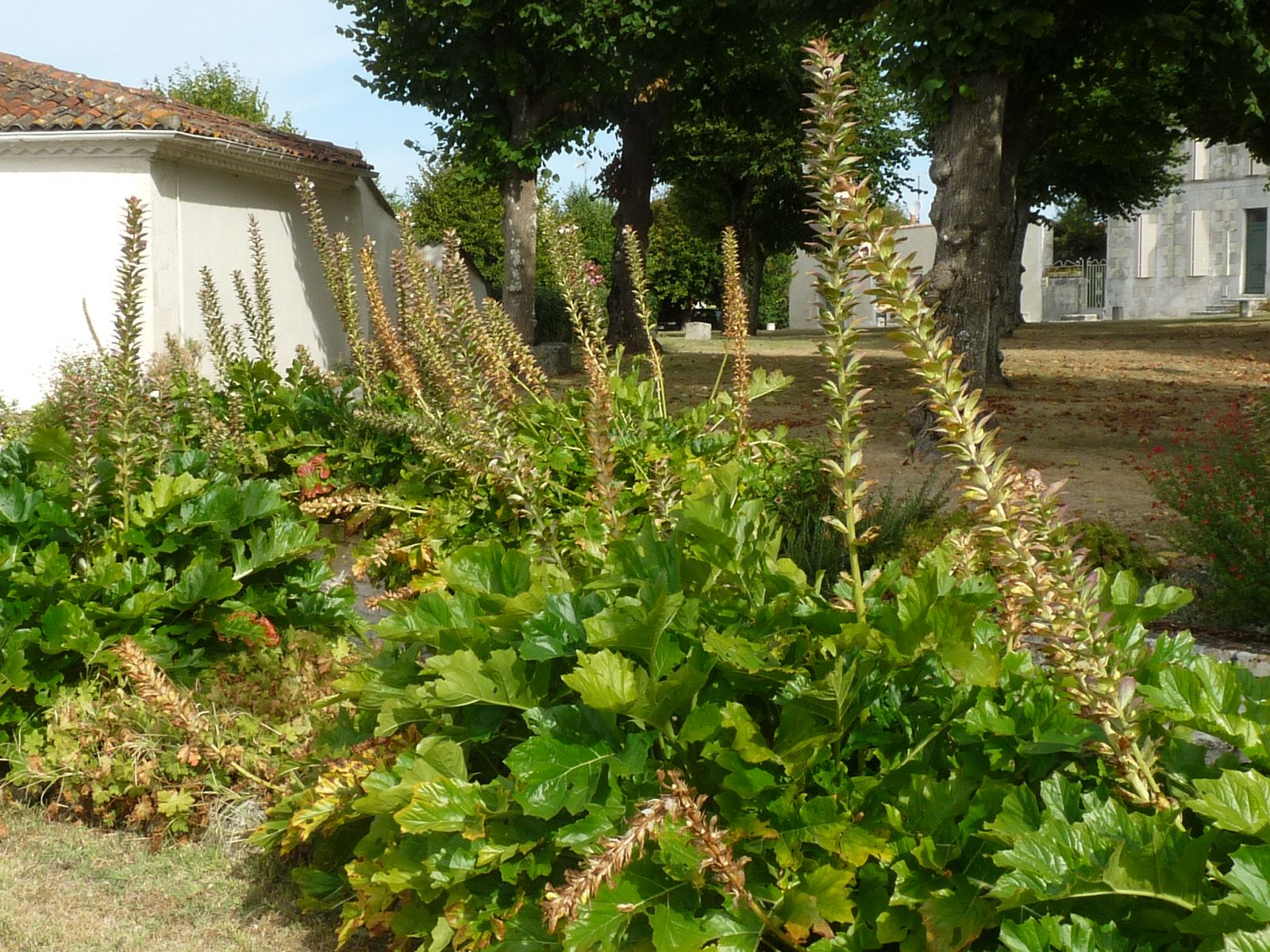 Acanthe à Arces-sur-Gironde (17), France